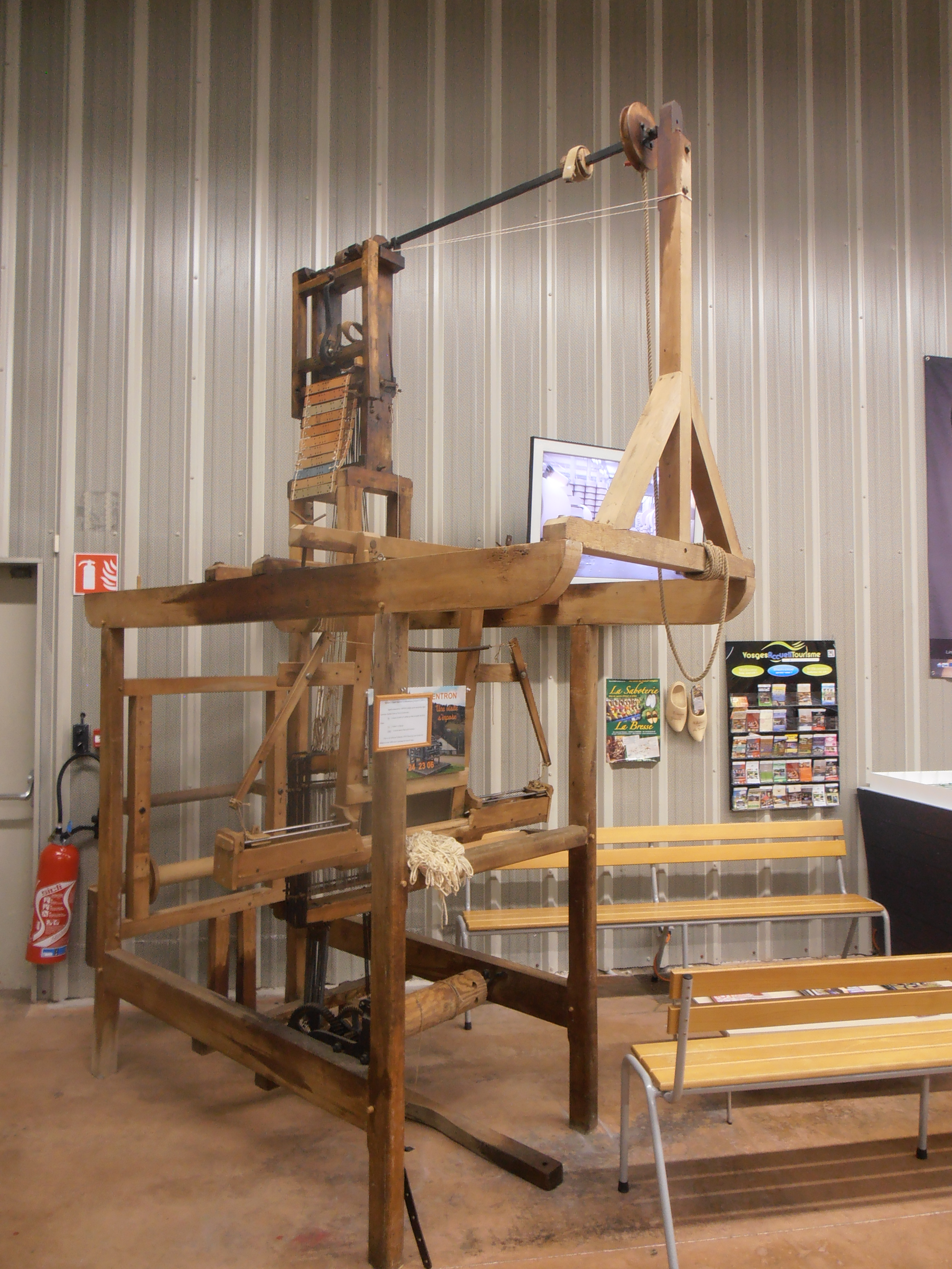 Vosges, La Bresse, Métier à tisser manuel à mécanique Jacquard (1860), présenté dans le magasin « Tissus Gisèle ». Machine prêtée par le musée du textile des Vosges à Ventron. Ce métier a été utilisé par l'entreprise SATO à Bavay, dans le Département du Nord (59), pour exécuter des tampons en coton pour le graissage des roues de trains.